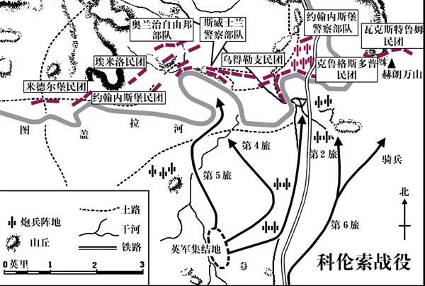 中文（中国大陆）: 科伦索战役示意图。参见第二次布尔战争。